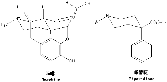 吗啡和哌替啶，自己绘制，本图片不允许百度百科使用